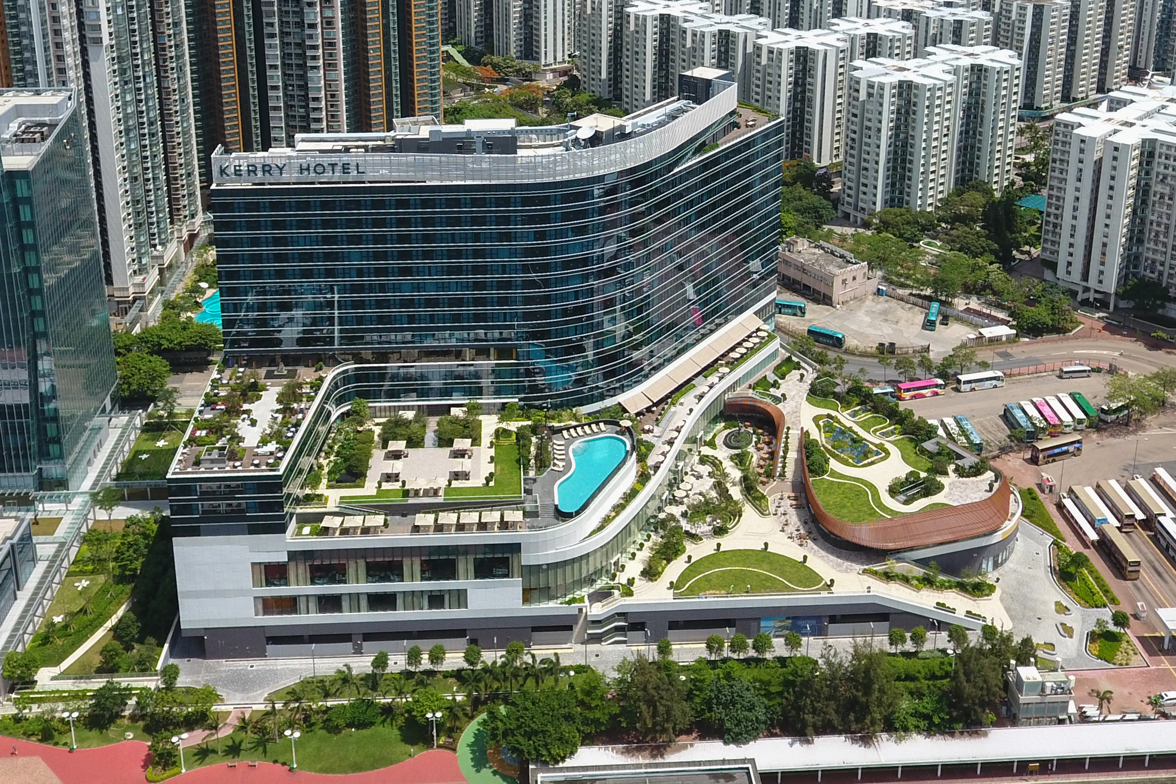 Kerry Hotel Hong Kong